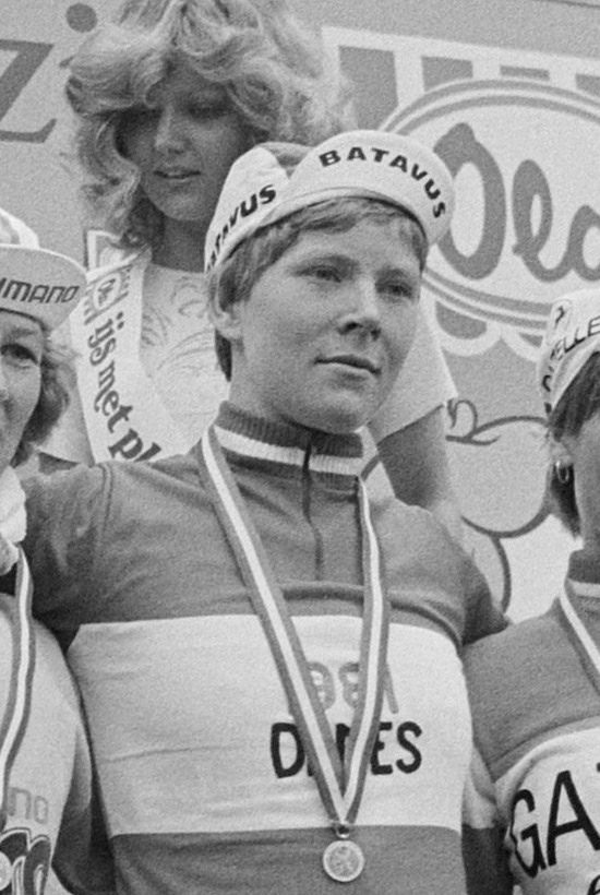 NK wielrennen op de weg te Geulle (amateurs en dames); H. Top (nieuwe Ned. kampioen)